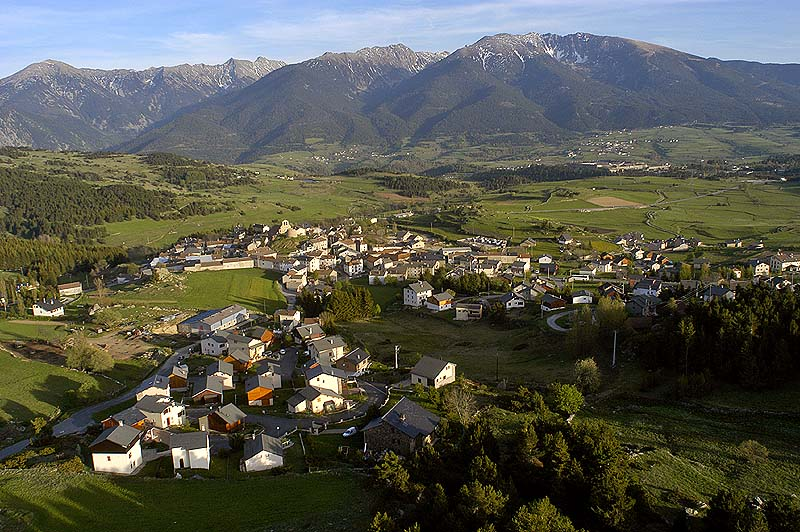 Sumari La Llagonne, vue aérienne. (Sascha mai 2005) (from french wikipedia: Image:La-llagonne-vue-aerienne.jpg)